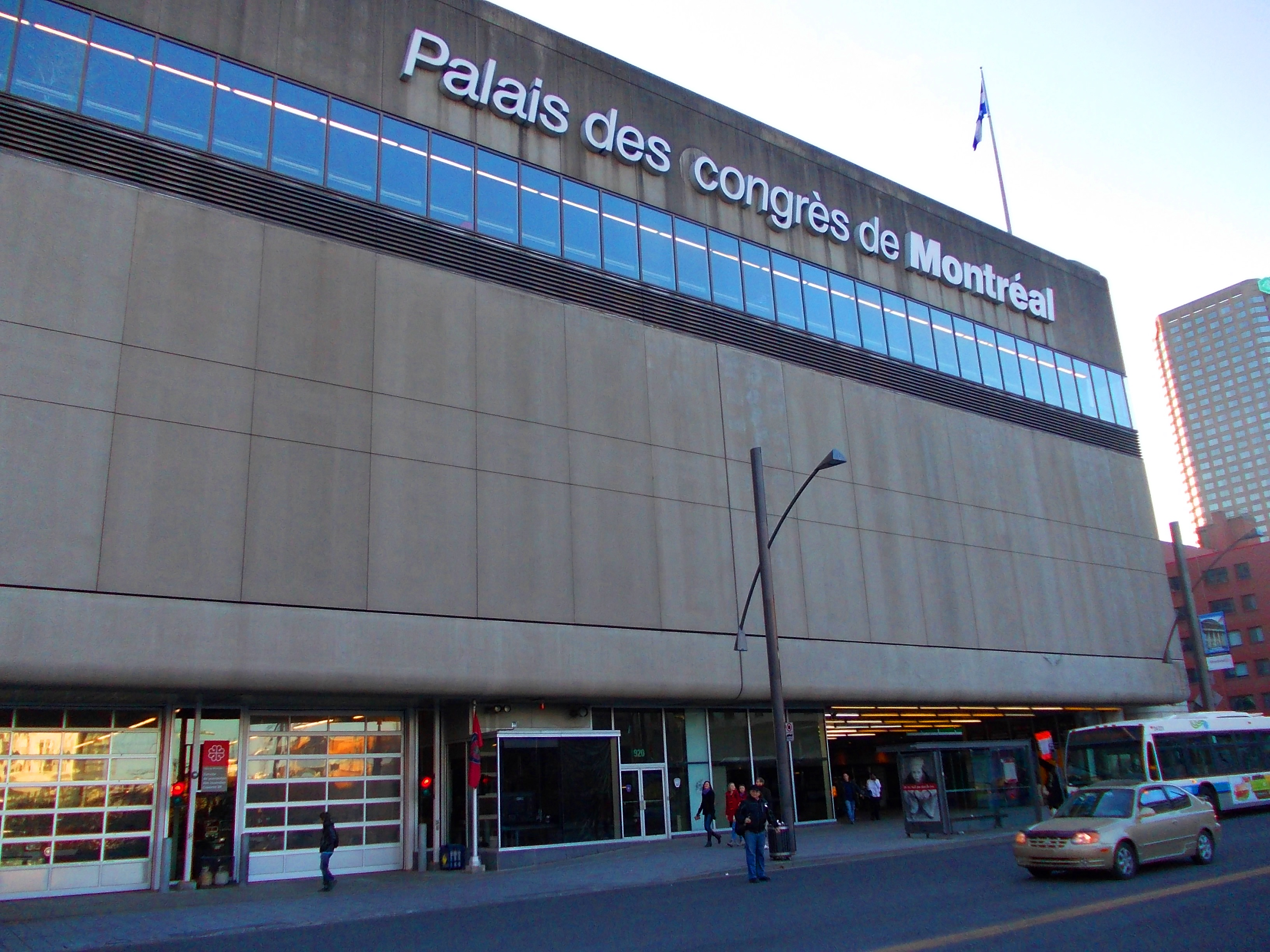 Palais des congrès de Montréal